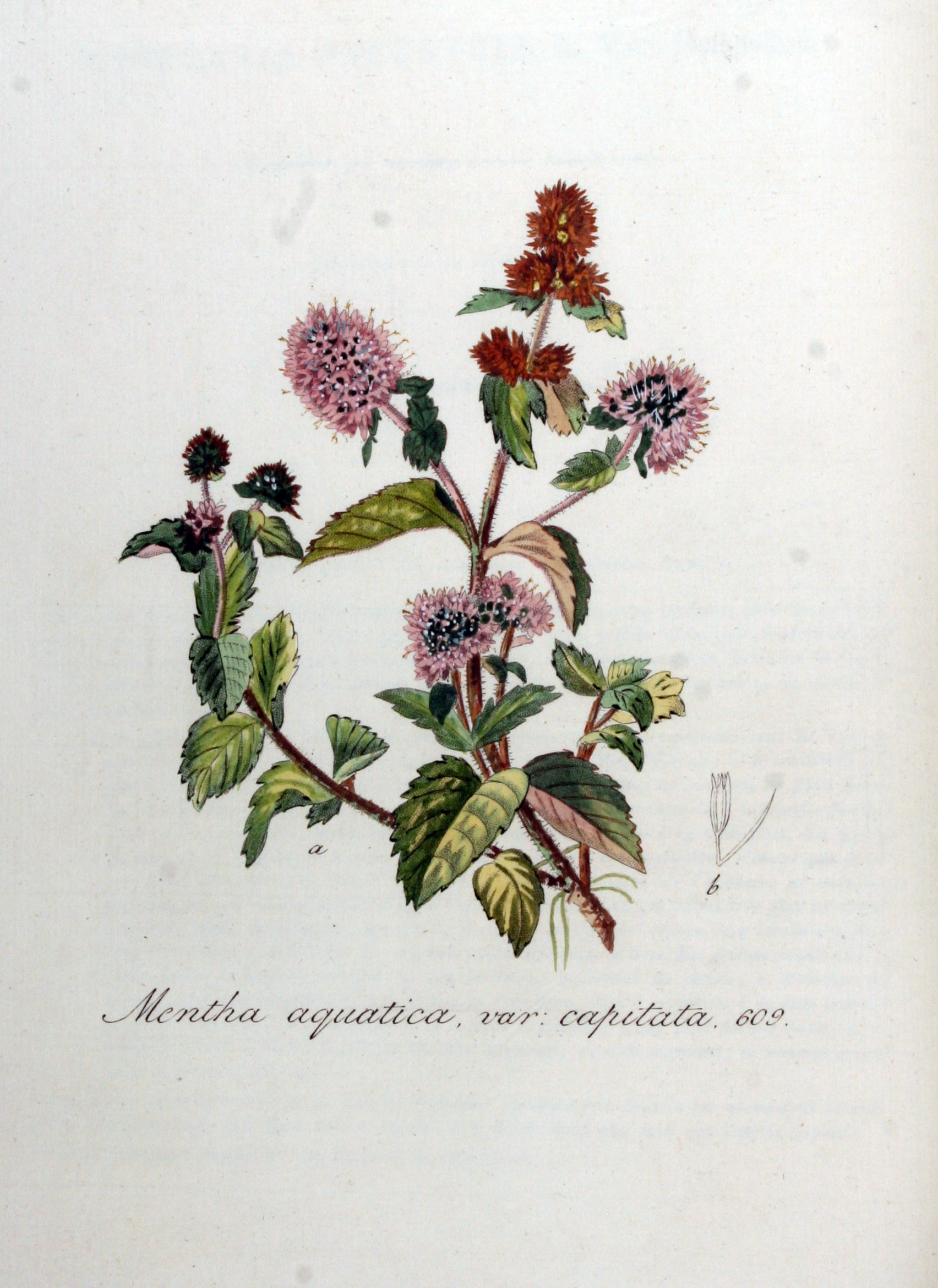 Mentha aquatica L. subsp. 'aquatica (Syn. Mentha aquatica var. capitata (Opiz) Briq.)